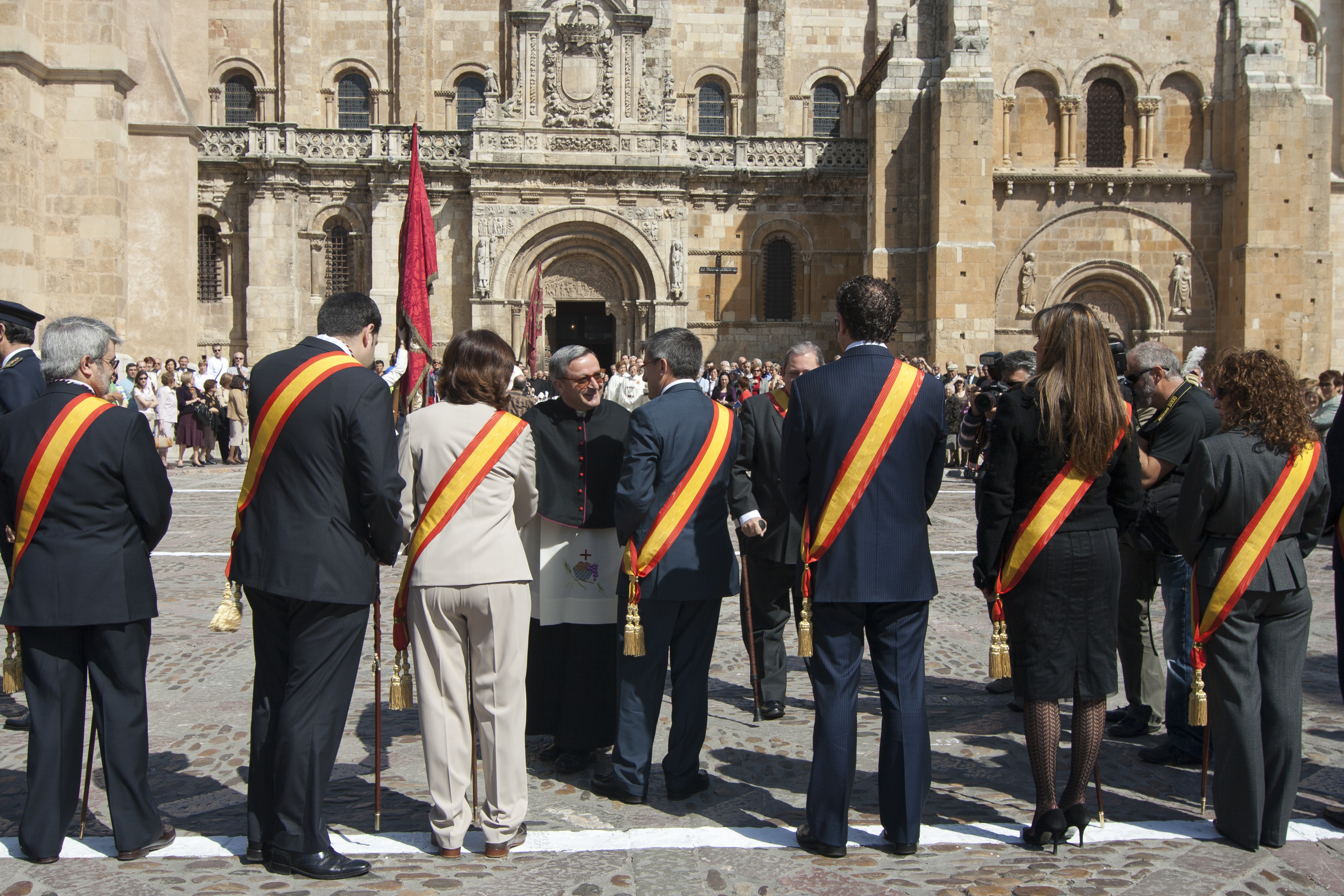 Fiesta de Las Cabezadas, León, España. Abril 2008. This is a photography of a Folklore festival in Spain (Wikidata id Q5970261).